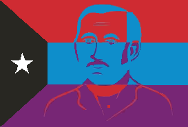 Bandera de la parroquia, José Gregorio Bastidas, municipio Palavecino, estado Lara, Venezuela